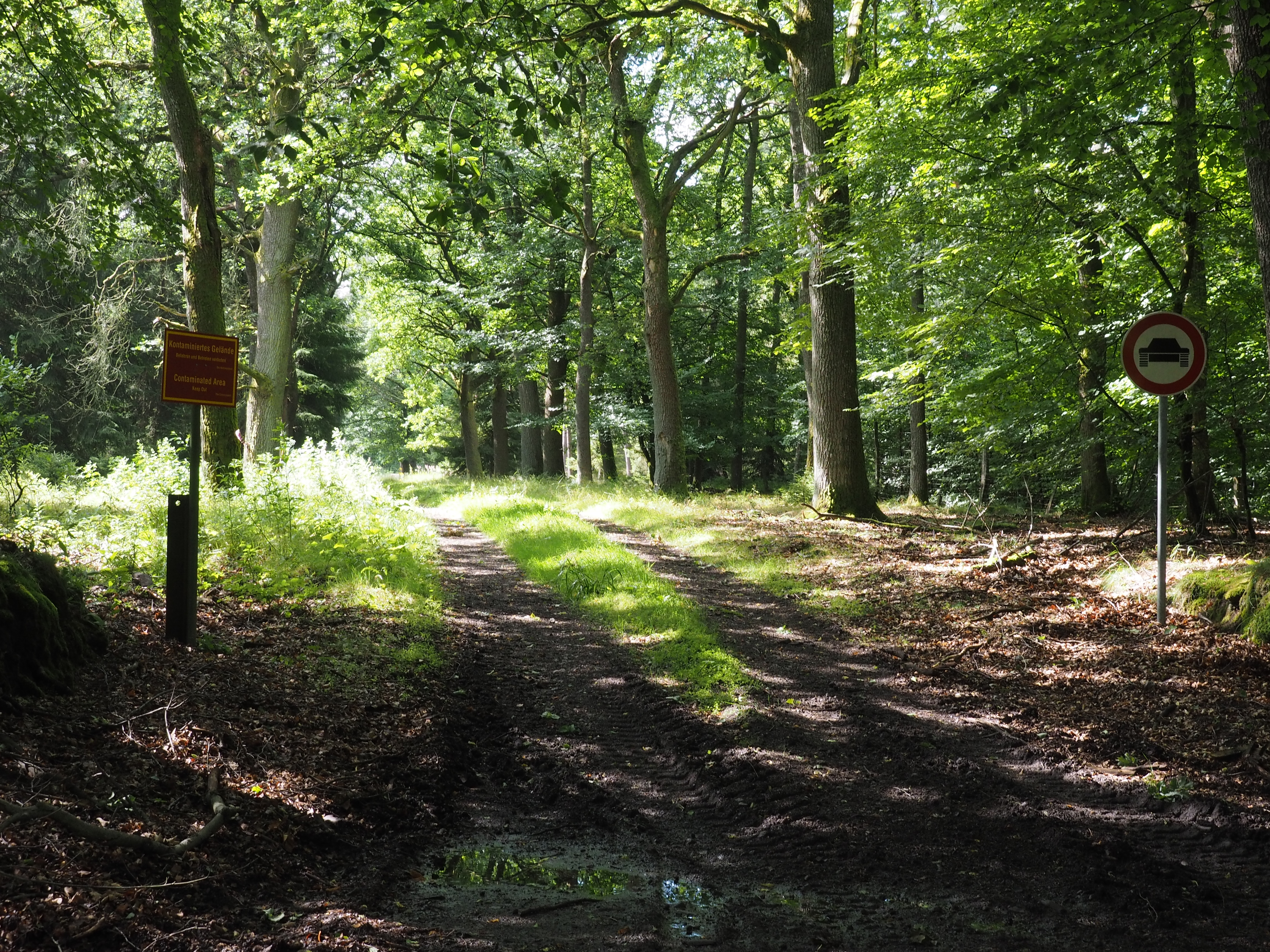 Eichen- und Buchenwald in der Raubkammer, Truppenübungsplatz Munster-Nord